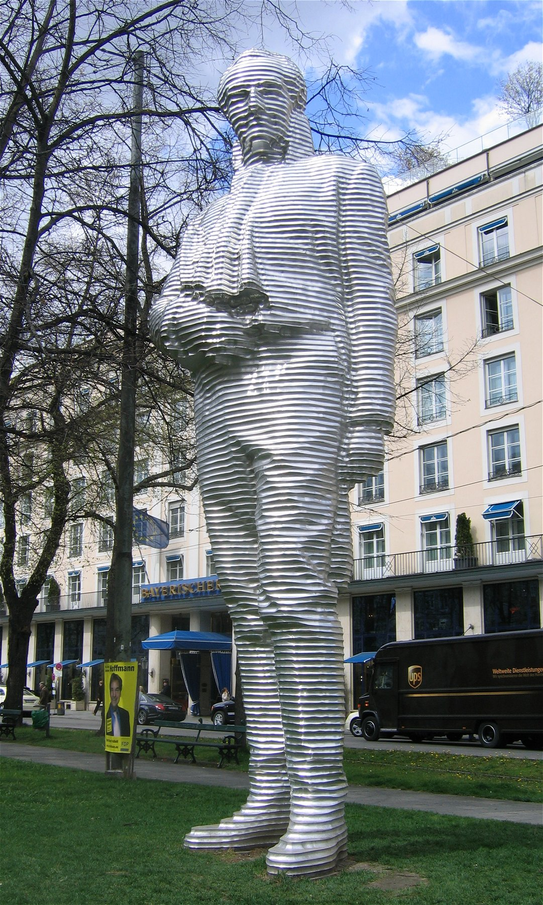 Aluminiumstandbild von Joseph Graf von Montgelas, Promenadeplatz München, 2005 von Karin Sander